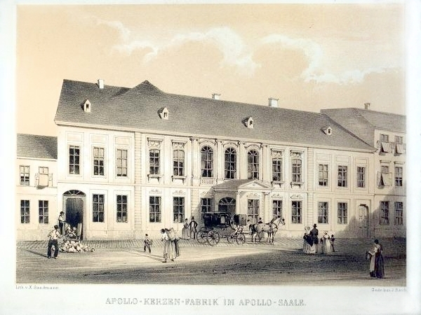 Lithographie der Apollo-Kerzenfabrik in der Zieglergasse im 7. Bezirk in Wien.